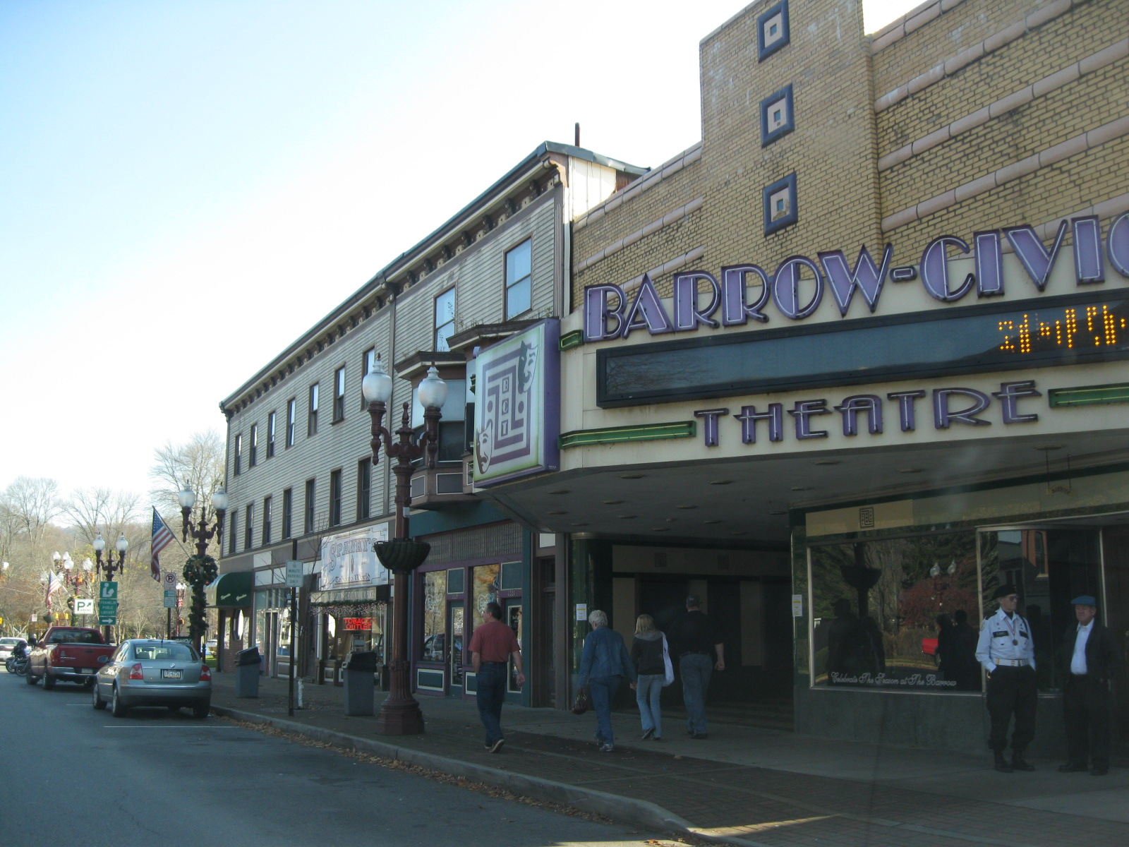 Franklin, Pennsylvania